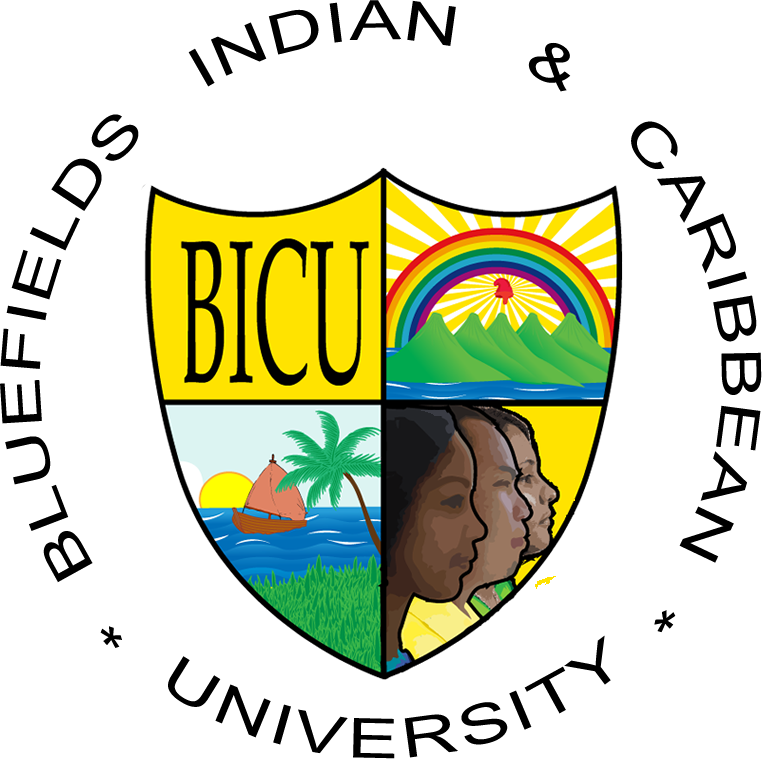 LOGO OFICIAL BICU